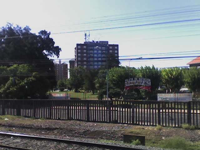 City of San Antonio de Padua, Merlo Partido, Buenos Aires Province, Argentina.